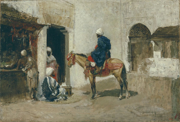 Pintura al óleo de Tomàs Moragas i Torras (Girona, 1837 - Barcelona, 1906), Tipus marroquí a cavall, conservada en el Museo Nacional de Arte de Cataluña. Barcelona (Spain) ( 48,5 x 71 cm)